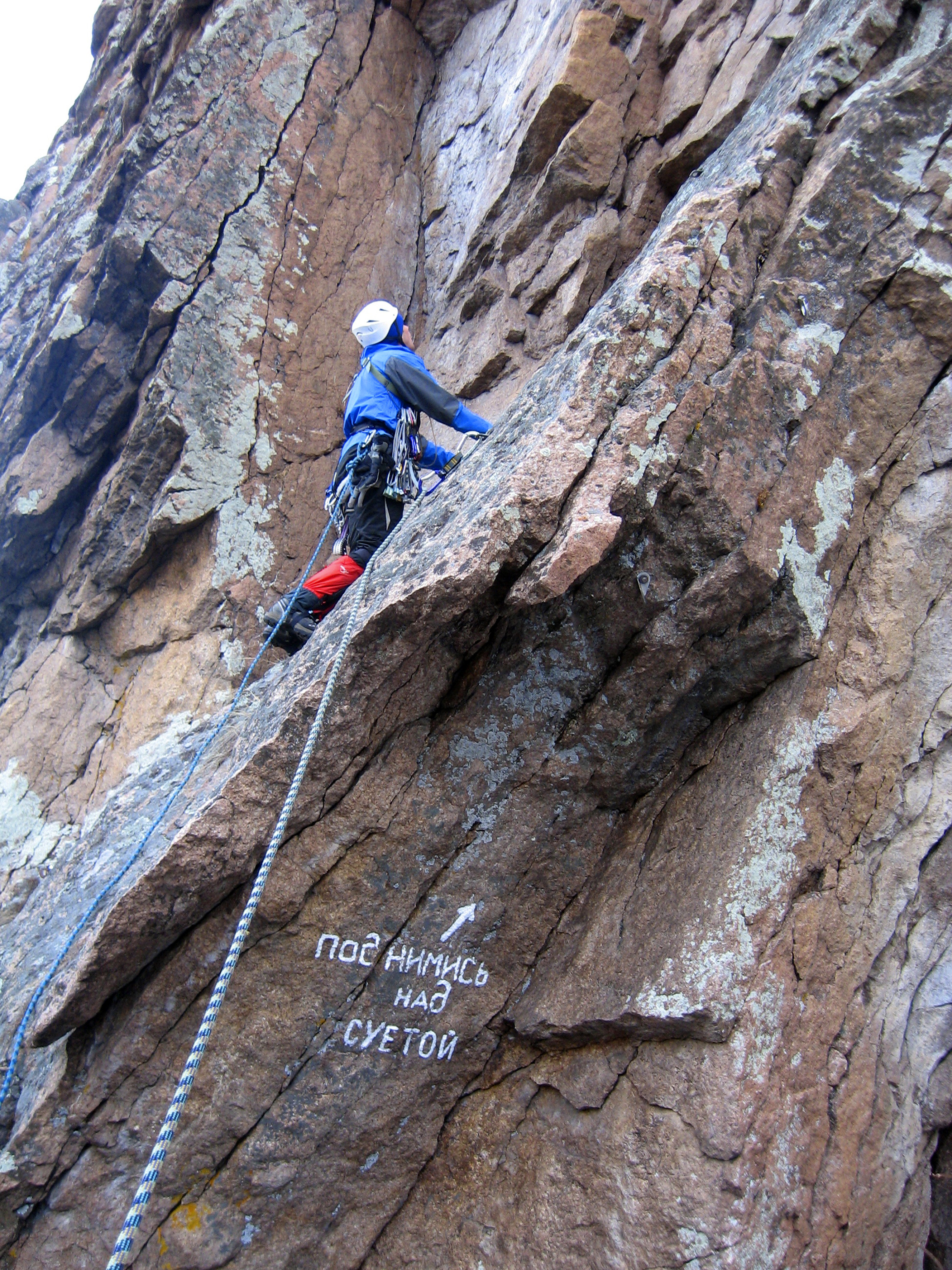 Соревнования на скале Китайская стенка проходят регулярно. Здесь хватает сложных трасс, но человек так устроен, что он стремиться преодолеть все препятствия и подняться над суетой. This image is related to the protected area of Russia number 2400031